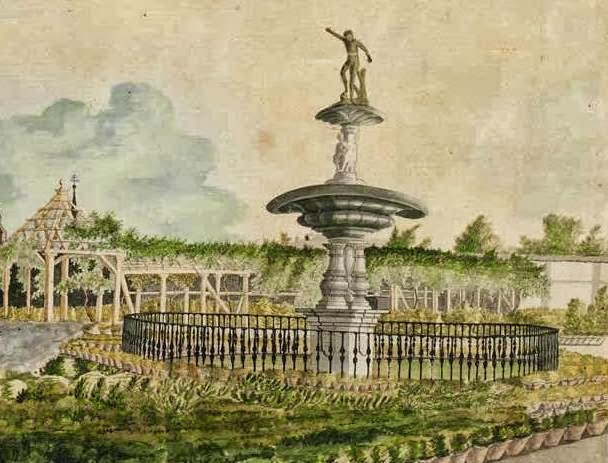 Detalle de la fuente ornamental de Narciso, en la glorieta de la ermita de san Pablo, en el Real Sitio del Buen Retiro de Madrid, mandada construir por Felipe IV, con diseños de Juan Gómez de Mora. Dibujo de Domingo de Aguirre (1742-1805).